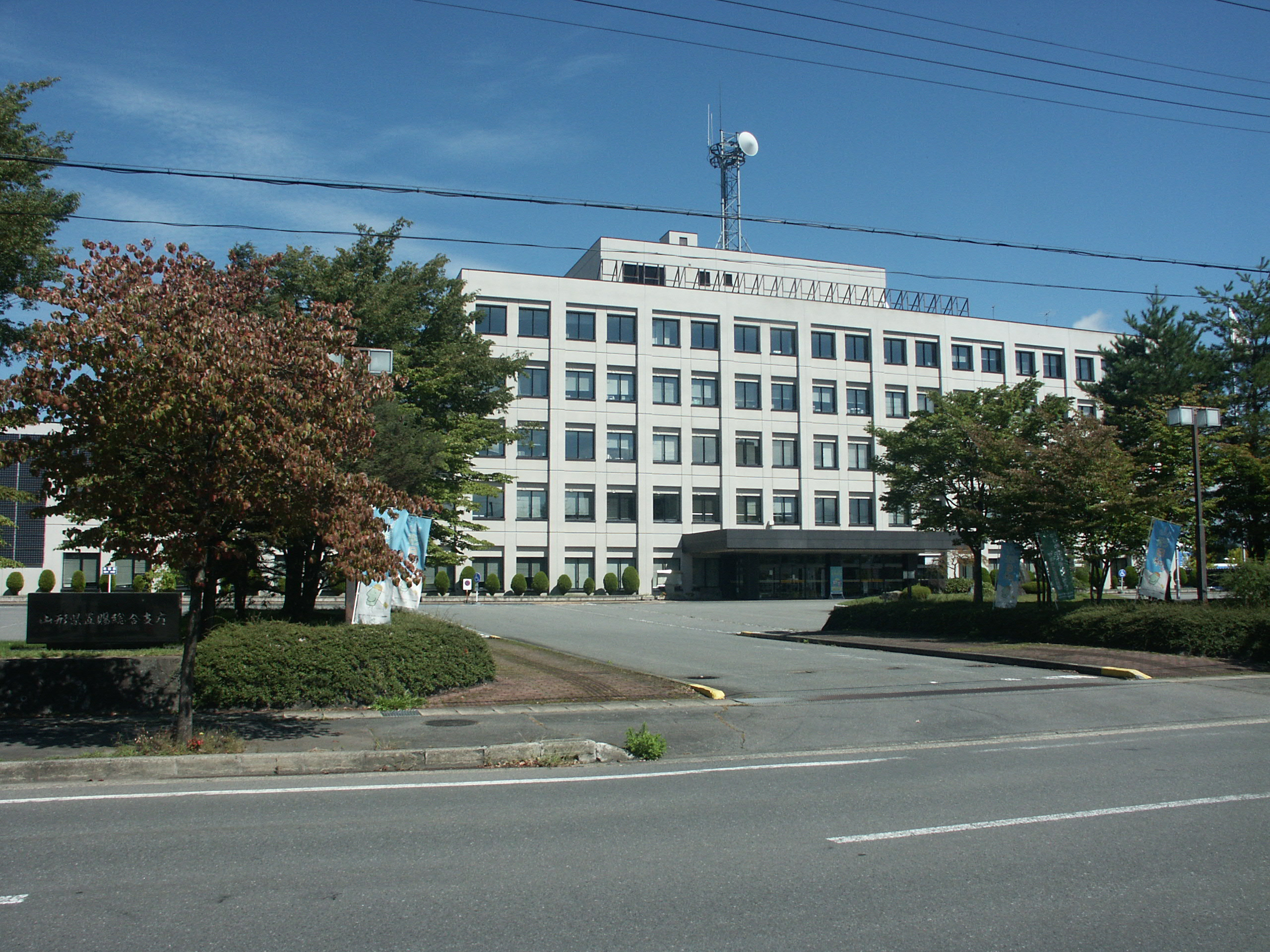 山形県置賜総合支庁庁舎